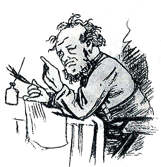 "Письмо донского помещика...". Рисунок. Н. П. Чехова. Из сборника "На досуге", не вышедшего в свет. 1883